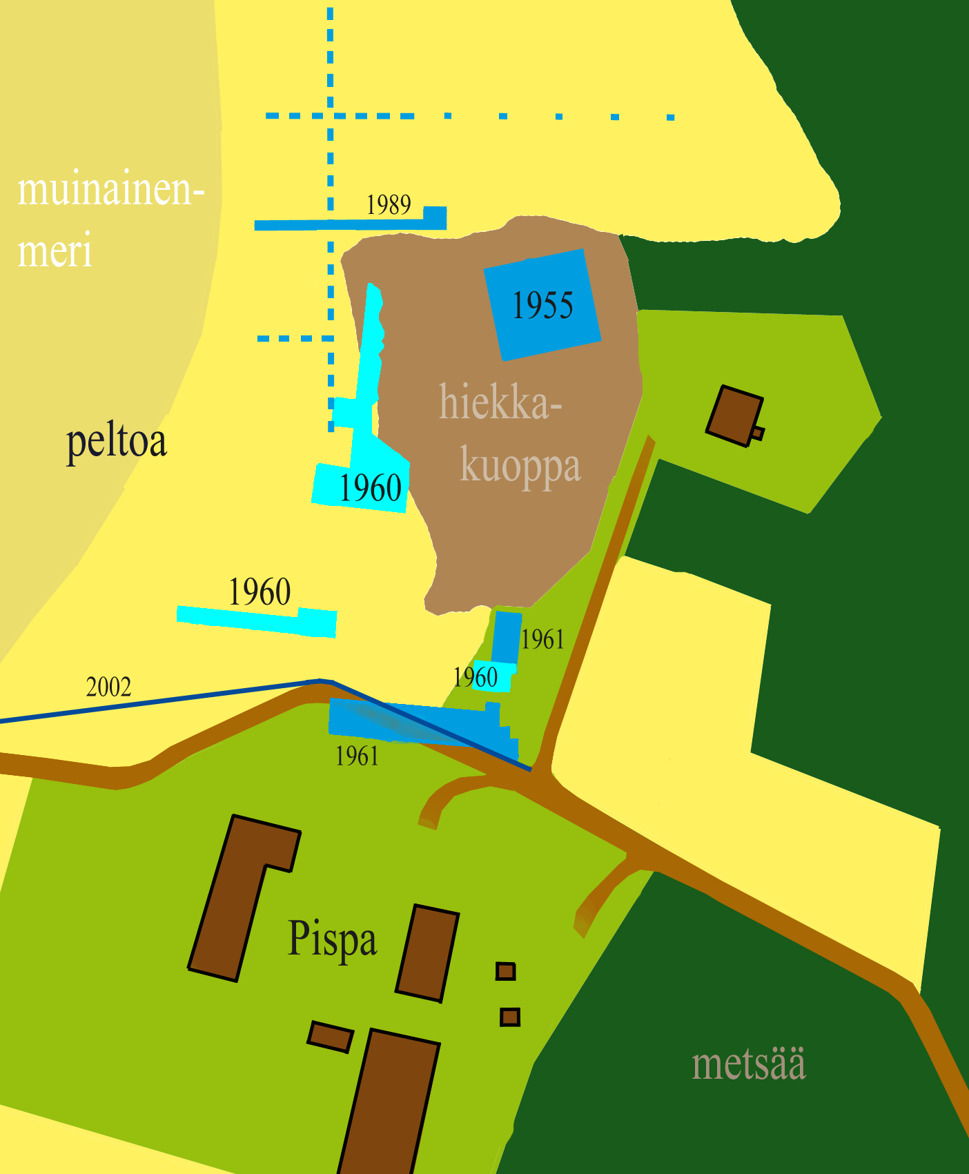 Pispan kivikautinen asuinpaikka Kokemäki, kaivaukset vuoteen 2002 mennessä. Lähde: vuoden 2002 kaivutyön valvontaraportti.